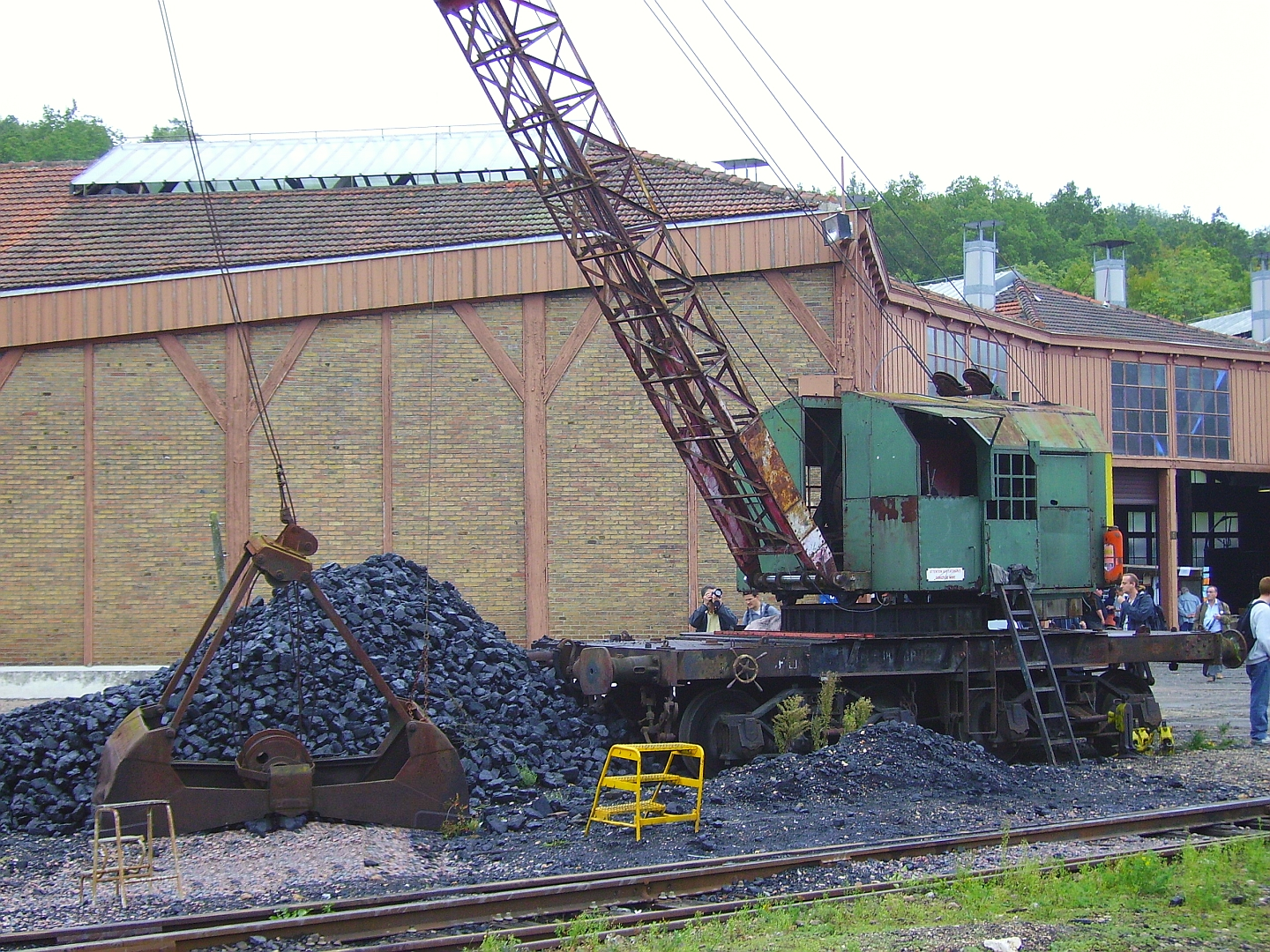 La grue à combustible sur rails type "BONDY" GP4 N°1, au dépôt de locomotives de Longueville le 16 septembre 2006.